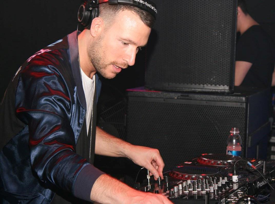 Don Diablo tijdens Bitter 'n Zoet 2013